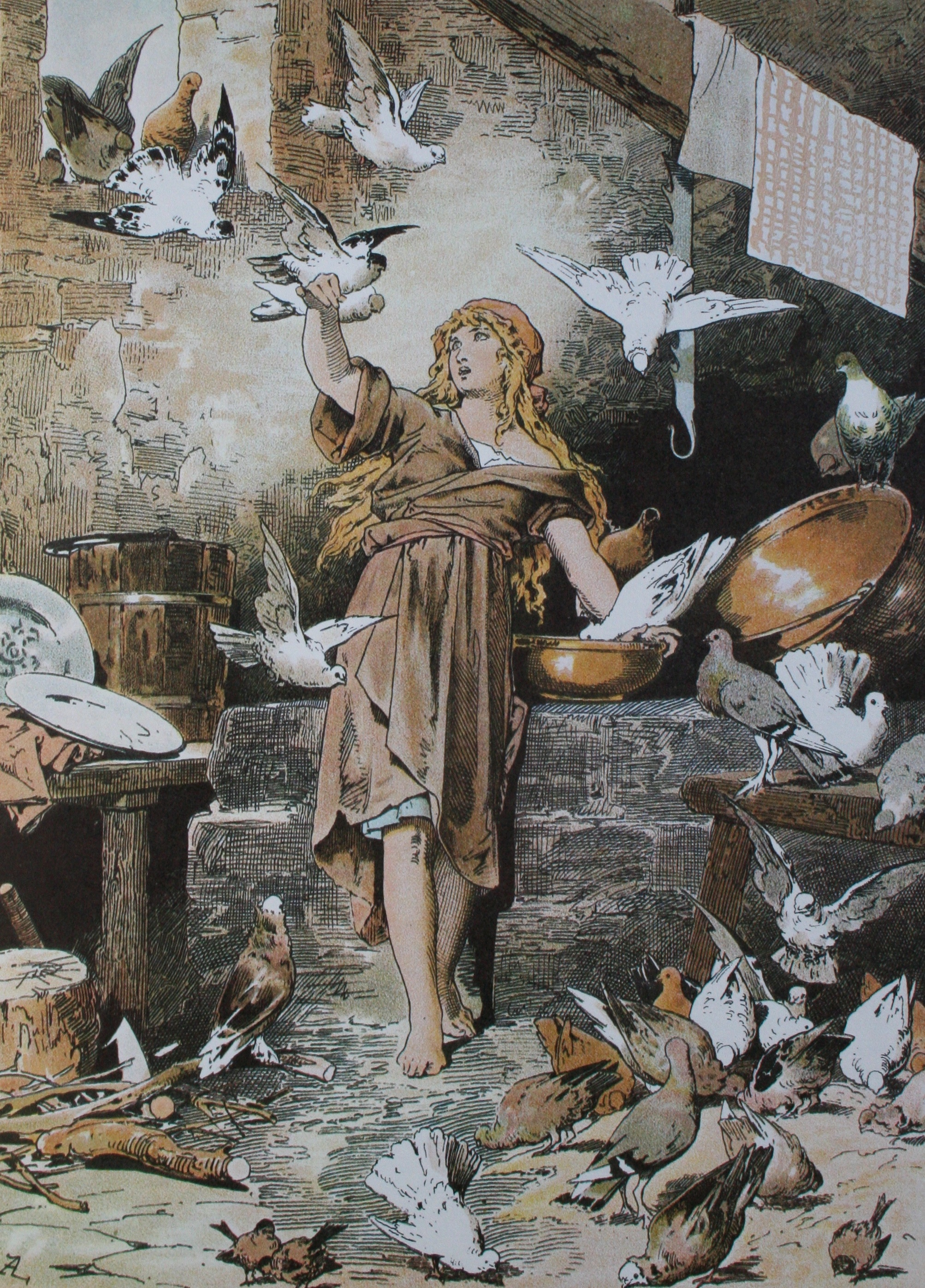 Aschenputtel; Darstellung von Alexander Zick (1845 - 1907)